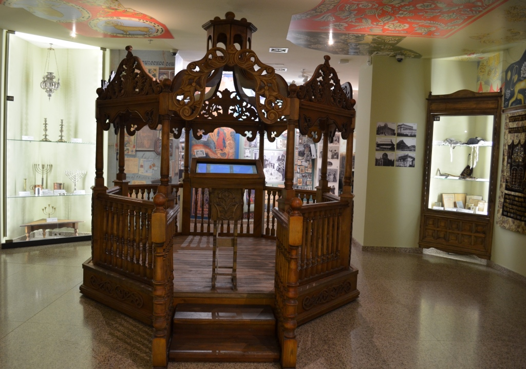 Духовная жизнь евреев